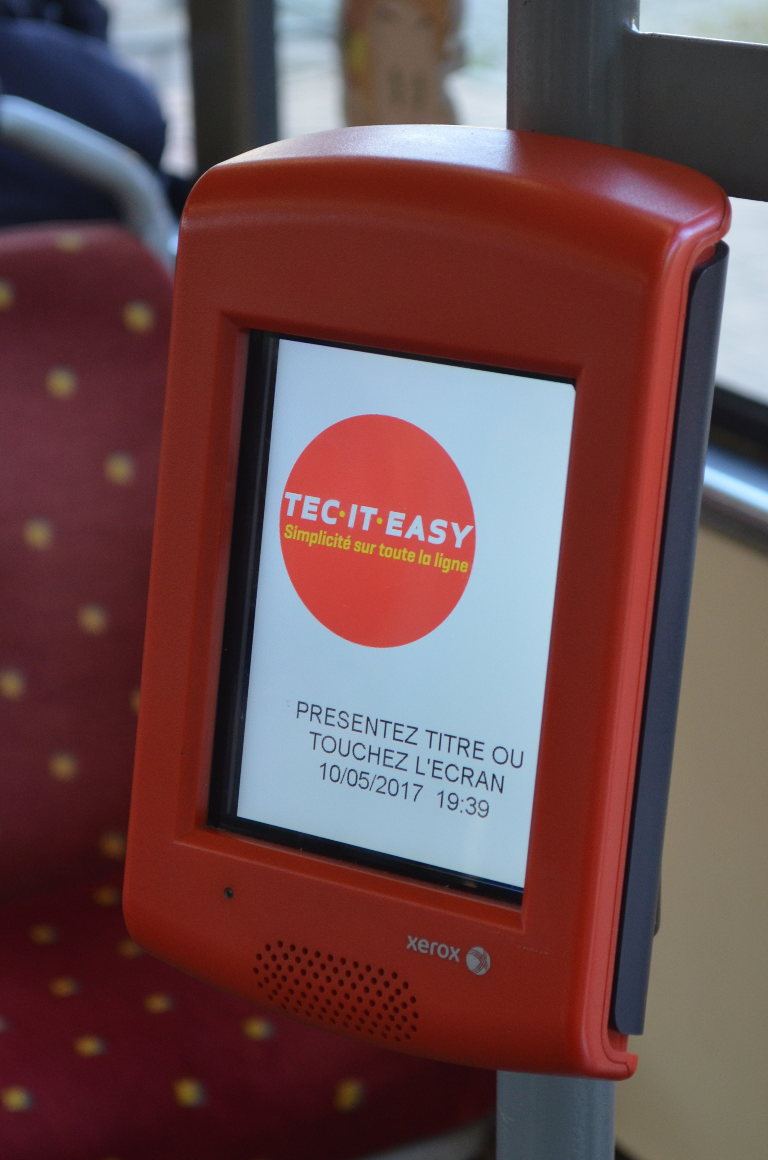 Borne de validation de titres de transport des TEC en Wallonie. Modèle depuis la mise en place du titre de transport électronique au format de carte à puce sans contact MoBIB.